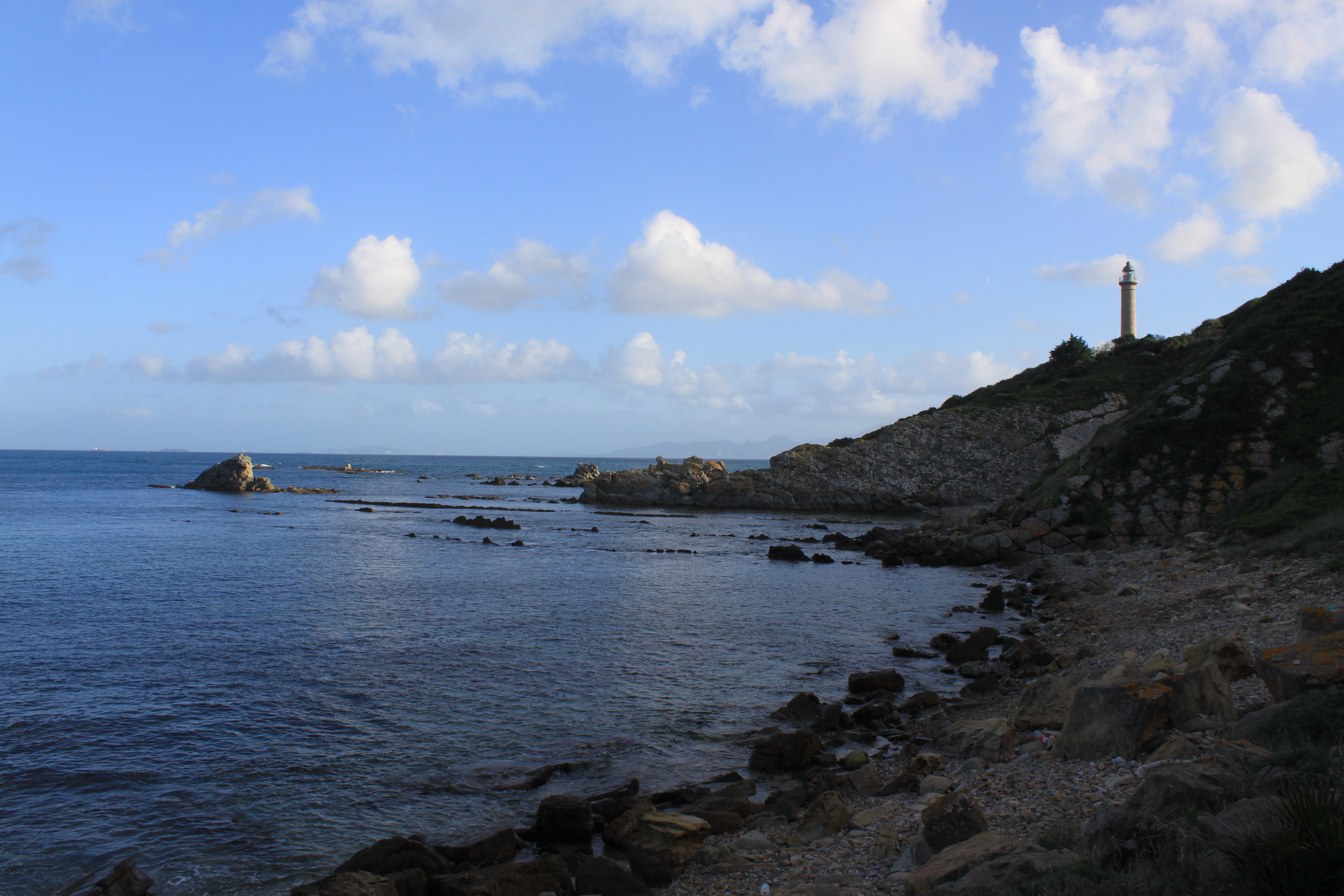 Punta Carnero en la costa de la bahía de Algeciras. En la ladera se observa el faro de Punta Carnero y a sus pies la piedra Mozilla y al fondo isla Cabrita.